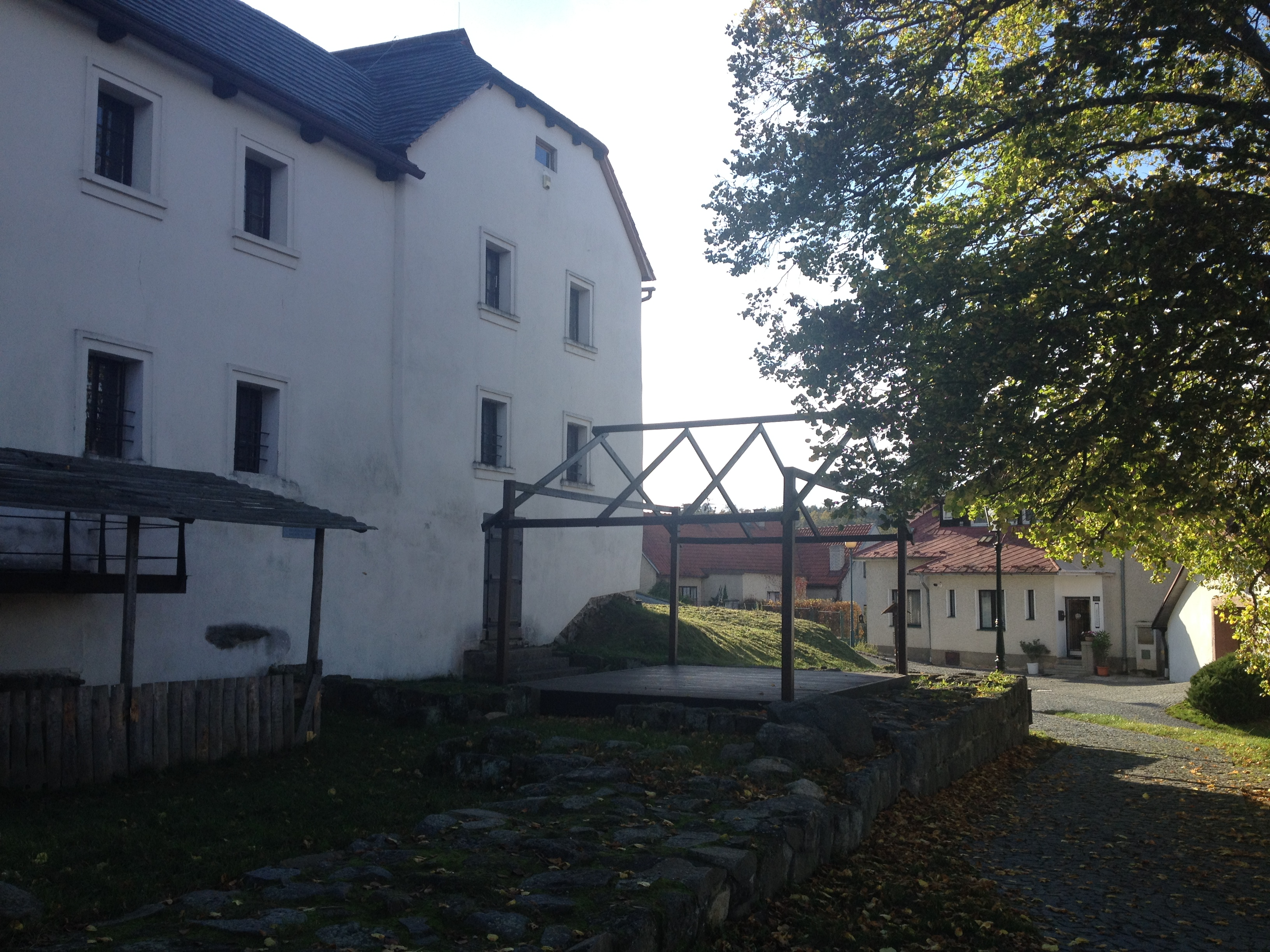 Letní divadelní scéna poblíž Týneckého hradu, Nádvoří Hodějovského 48.